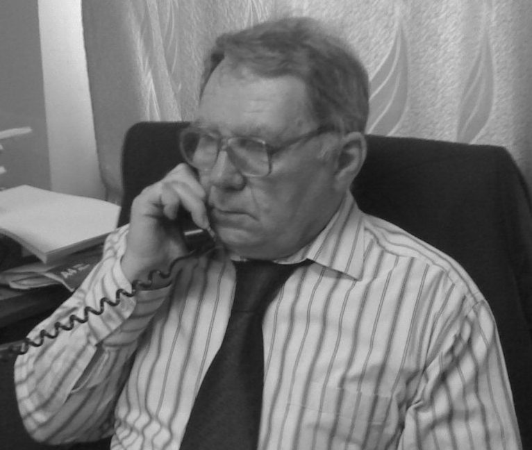 Зображення Володимира Широкова у робочому кабінеті